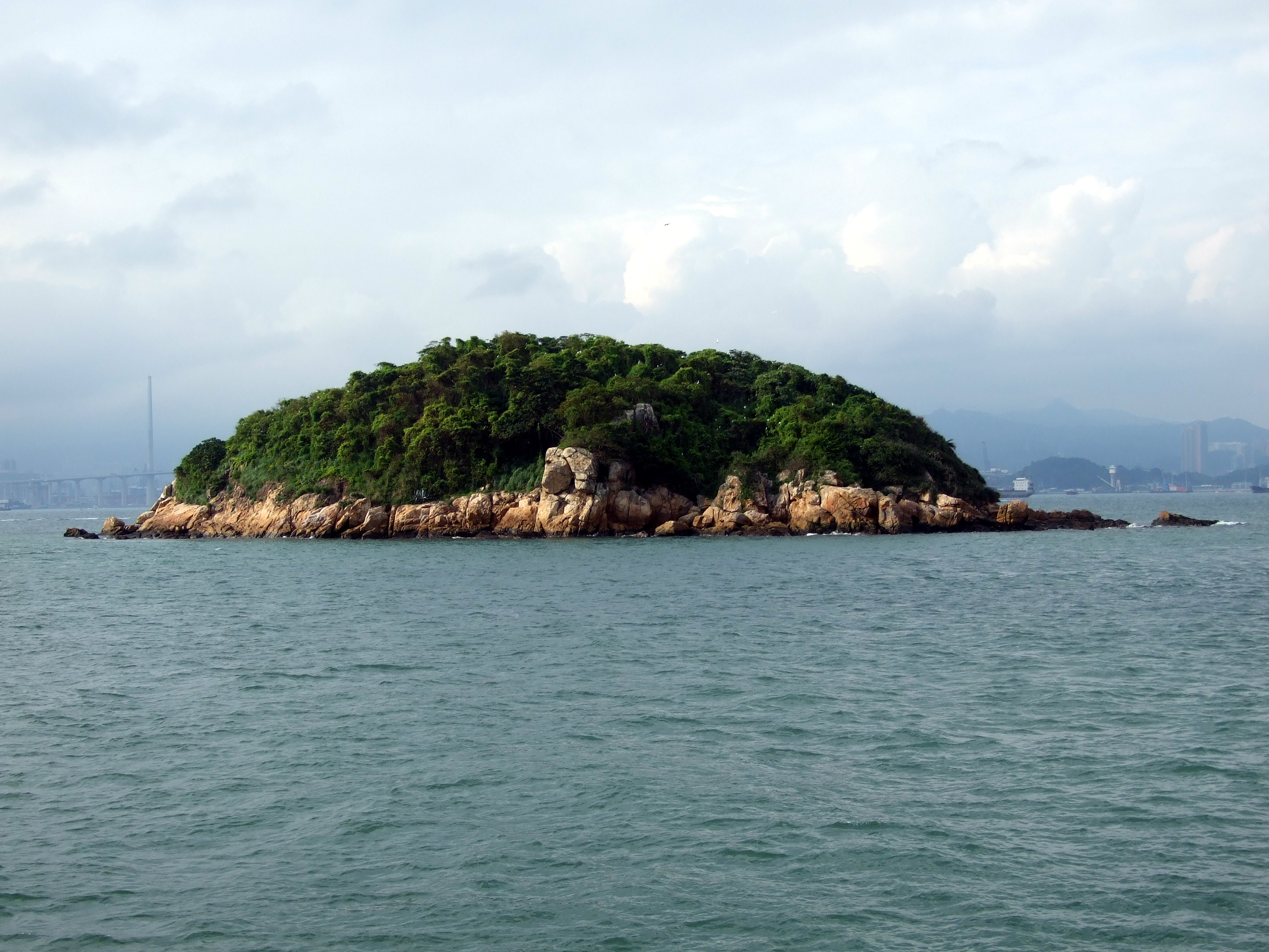 中文（香港）: 小青洲